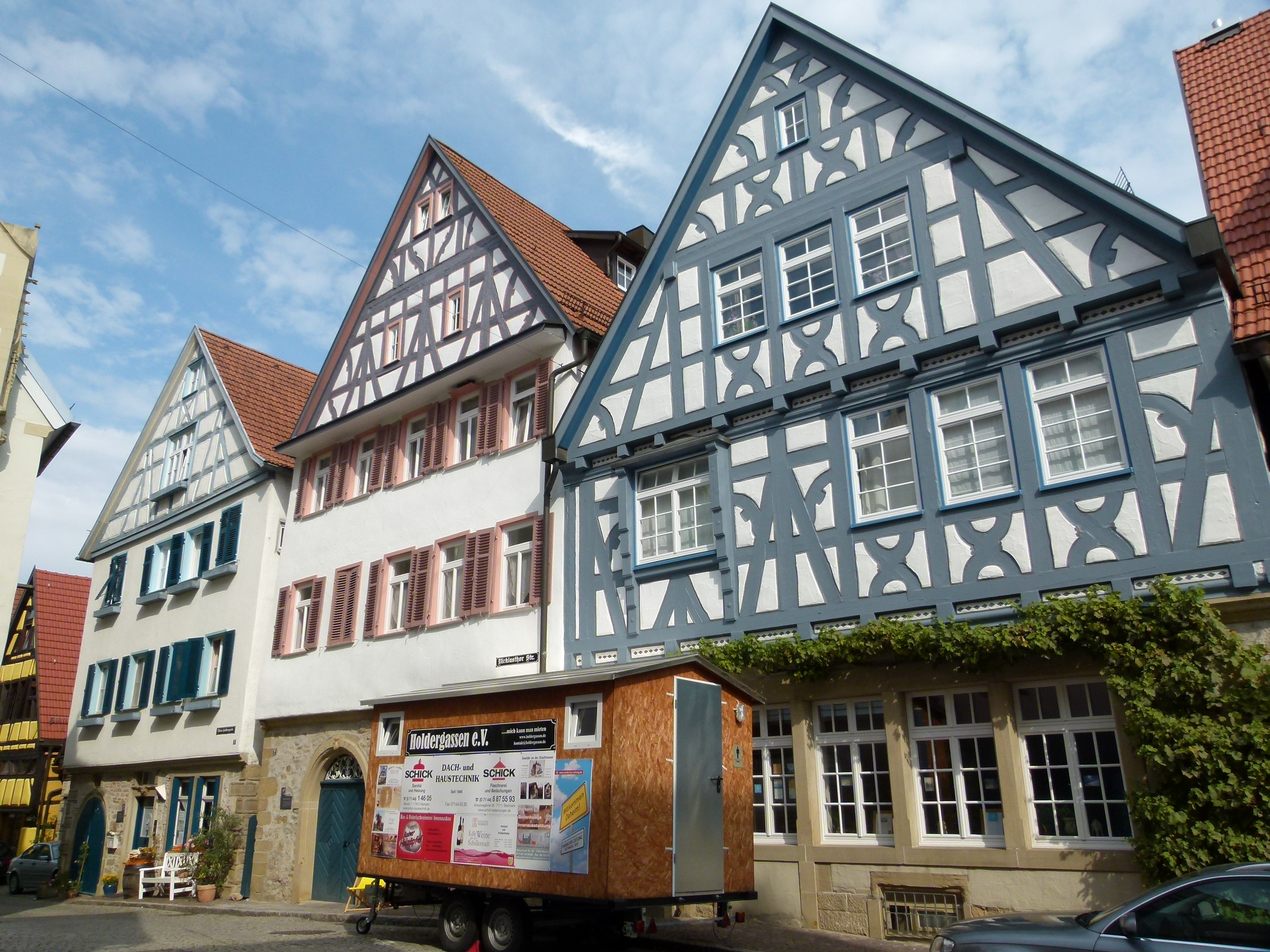 Nicklasthorstraße 7-9, Marbach am Neckar